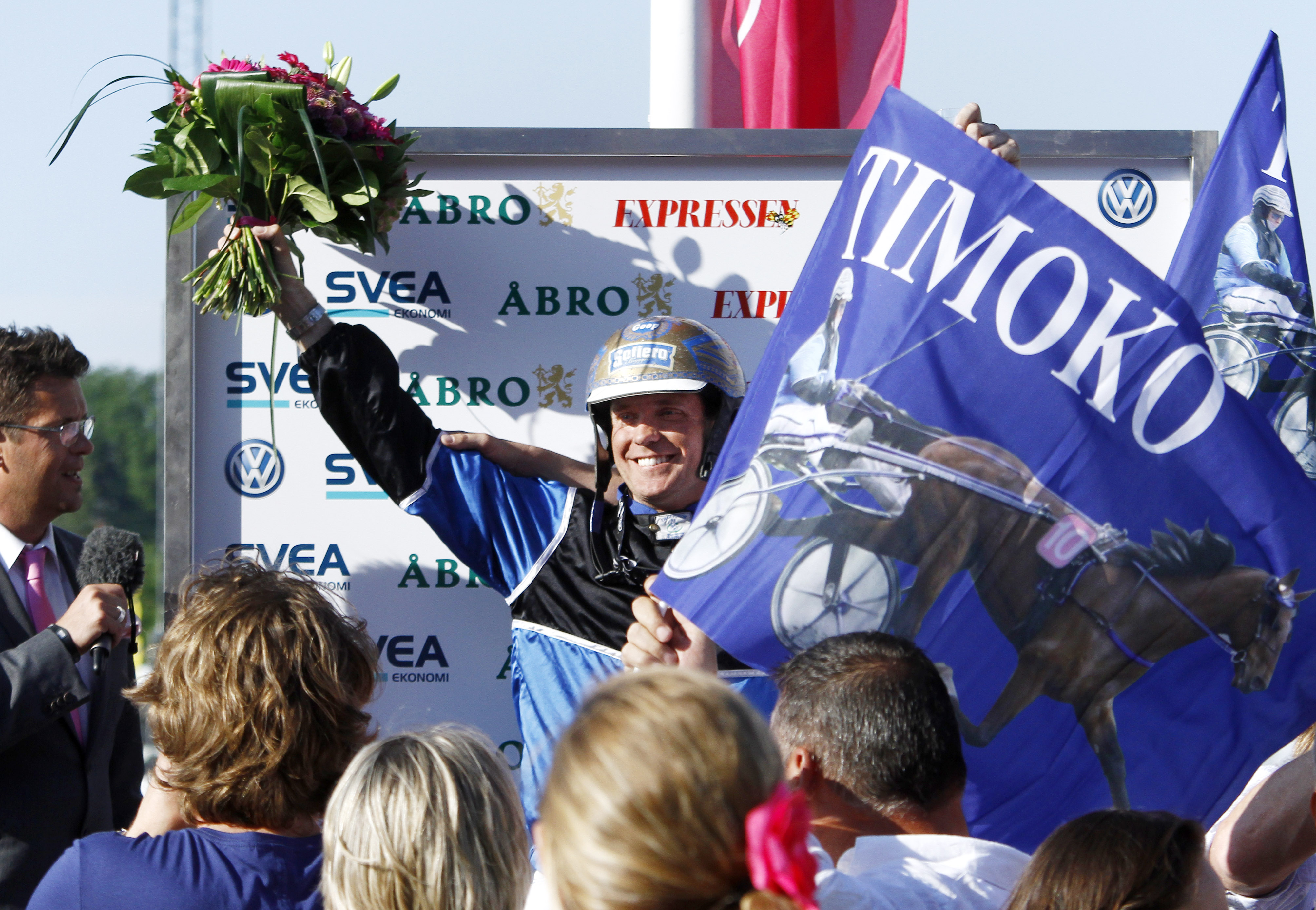 Kusken Björn Goop firar segern i Elitloppet 2014 på Solvalla med franske travaren Timoko.